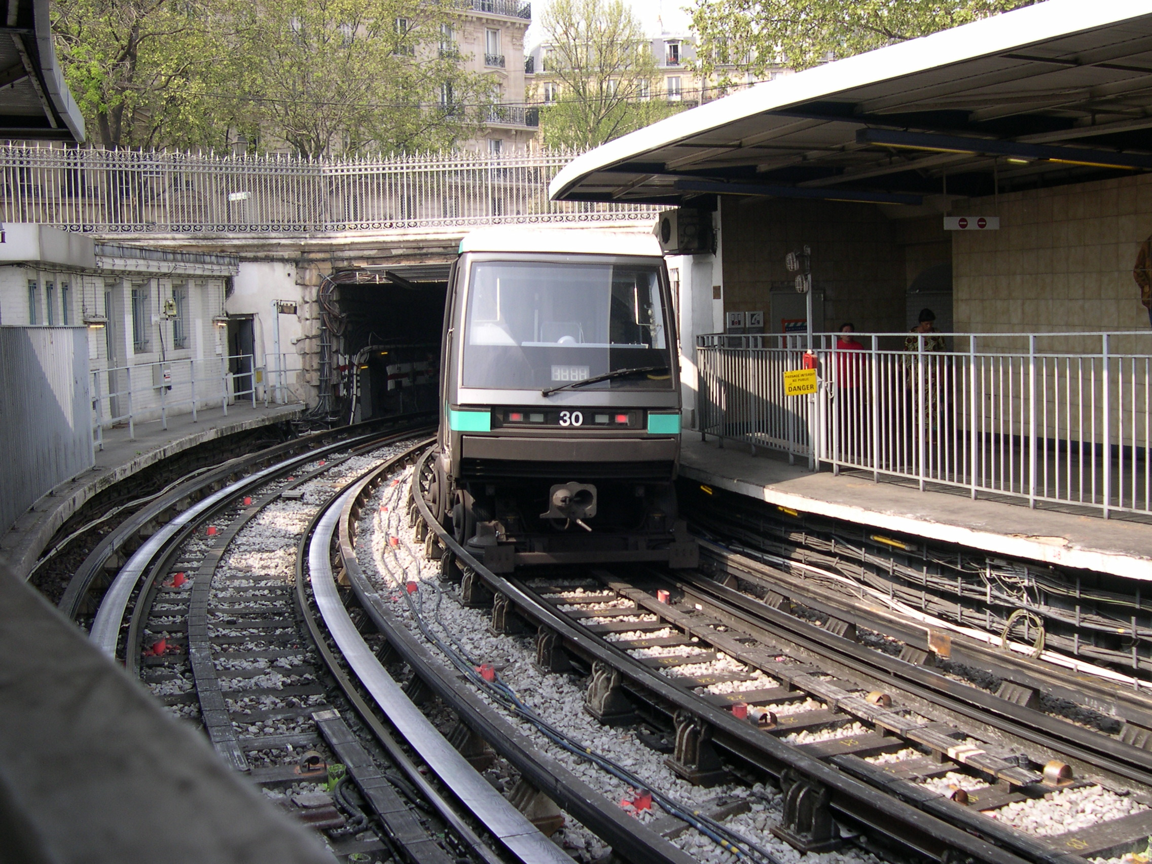 fährt auf Gummireifen